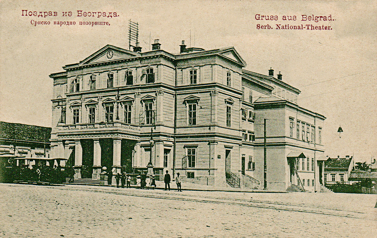 Srpski (latinica): Narodno pozorište u Beogradu početkom 20. veka